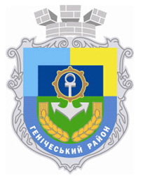 Герб Генічеського району